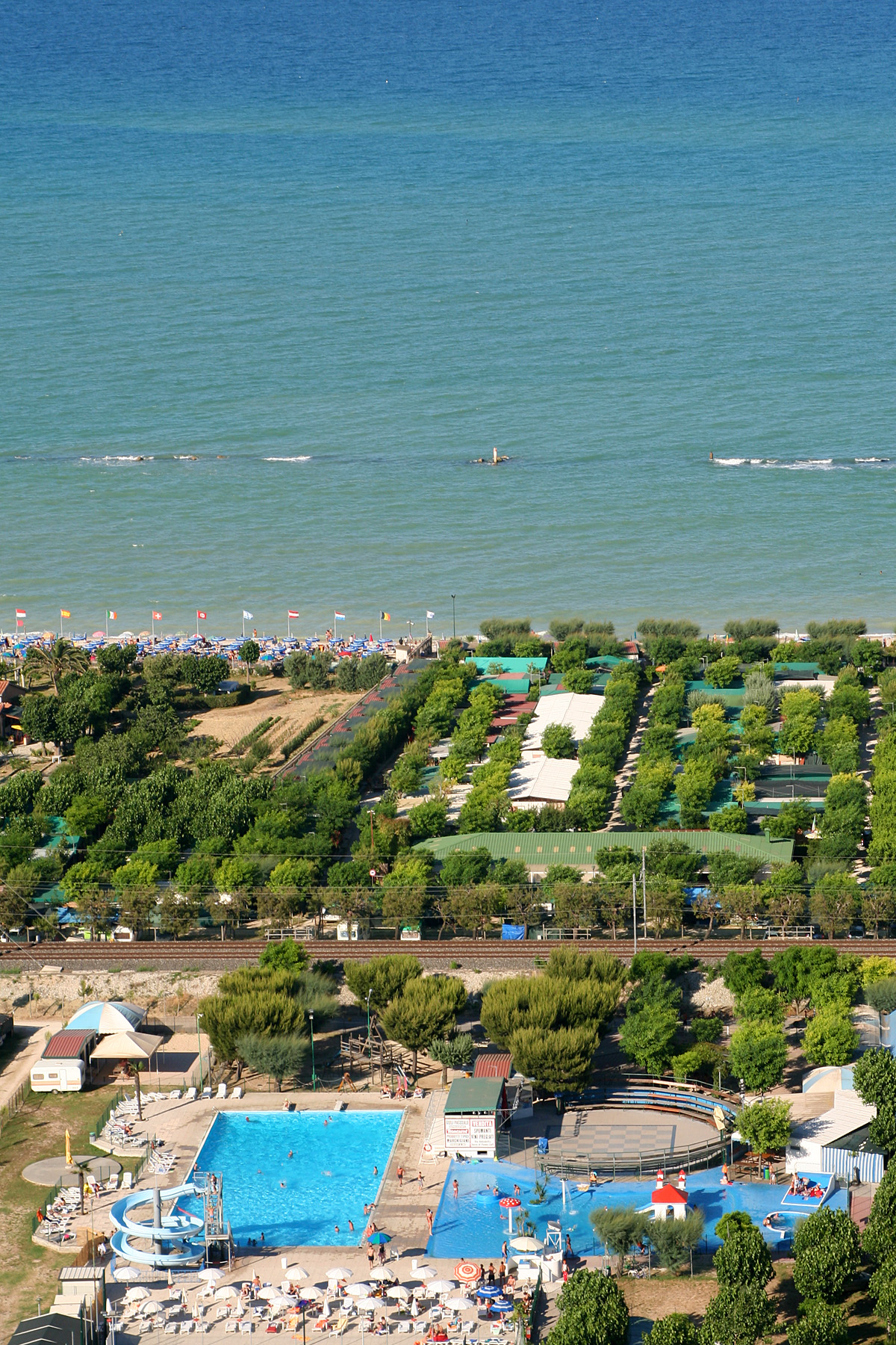 Grottammare (AP)